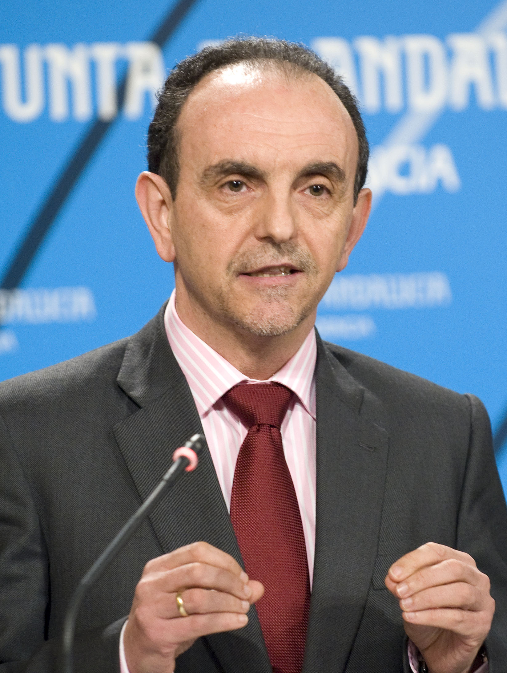 Consejero de Turismo y Comercio de la Junta de Andalucía